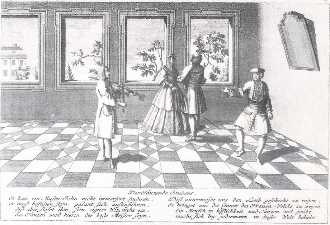 "Dendrono" (Johann Georg Puschner, 1680-1749), "Der tanzende Student", Kupferstich von 1725, Szenen aus dem Leben der Studenten an der Universität Altdorf: Der Tanzende Student Es kan ein Musen-Sohn nicht immerfort studiren, er muß beflißen seyn galant sich aufzuführen, diß aber flöset ihm sein eigner Wiz nicht ein, das Tanzen wird hierin der beste Meister seyn, Diß unterweiset uns den Leib geschickt zu regen, Es bringet uns die Gunst des Frauen-Volcks zu wegen. Ein Mensch in höflichkeit und Tanzen wol geübt, macht sich bey jedermann in dieser Welt beliebt.